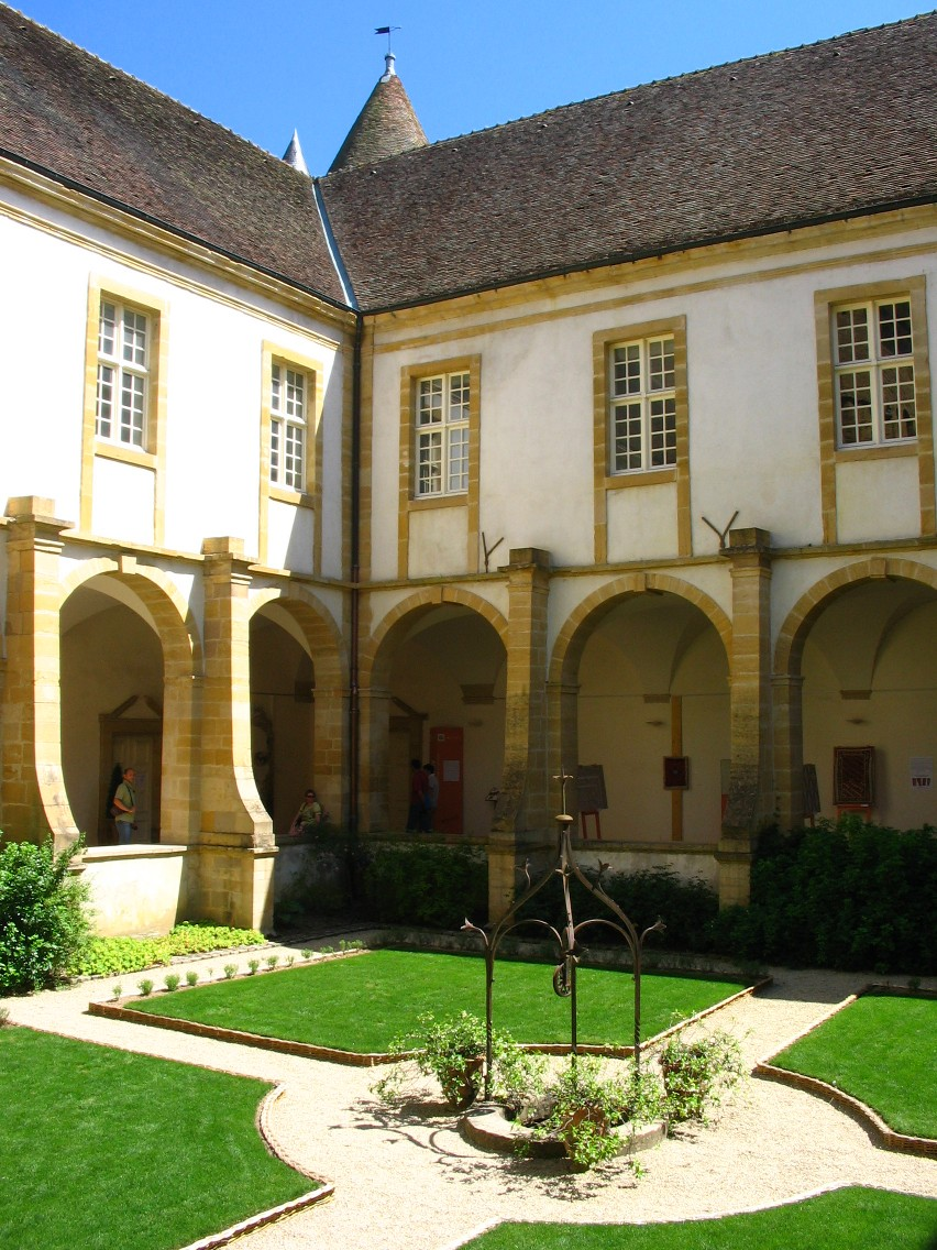 Accolés au flanc sud de la basilique du Sacré-Coeur de Paray le Monial, Saône et Loire, le prieuré Notre-Dame et son cloître, réaménagés au XVIIIe avant restauration en 1986.